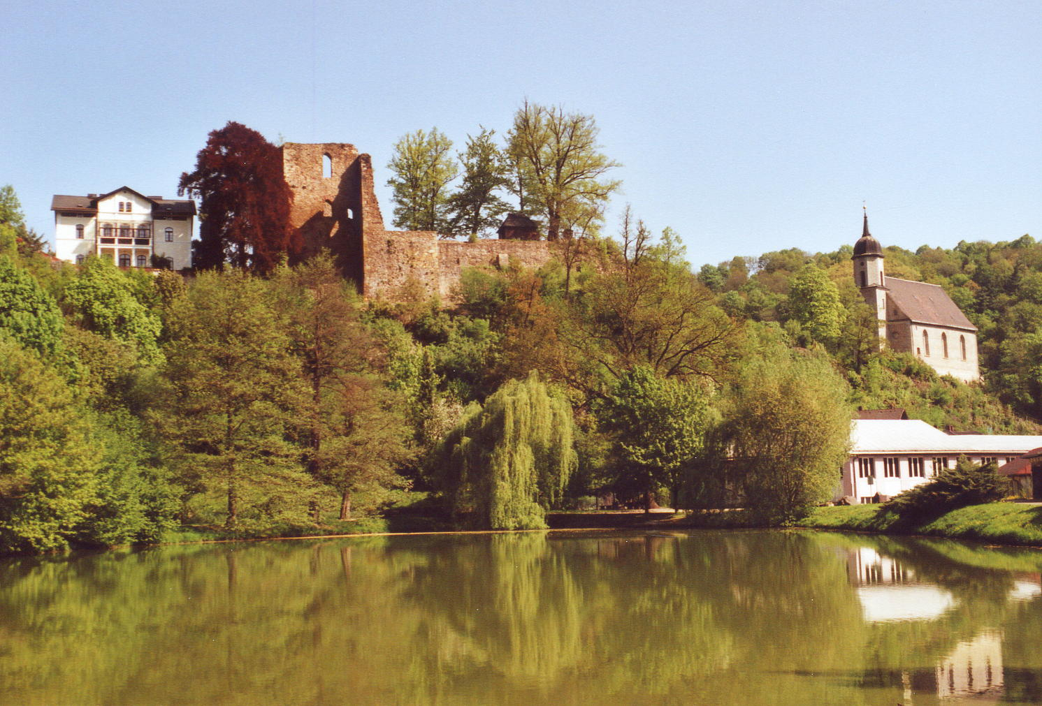 Burg Tharandt: Blick auf Burg und Bergkirche